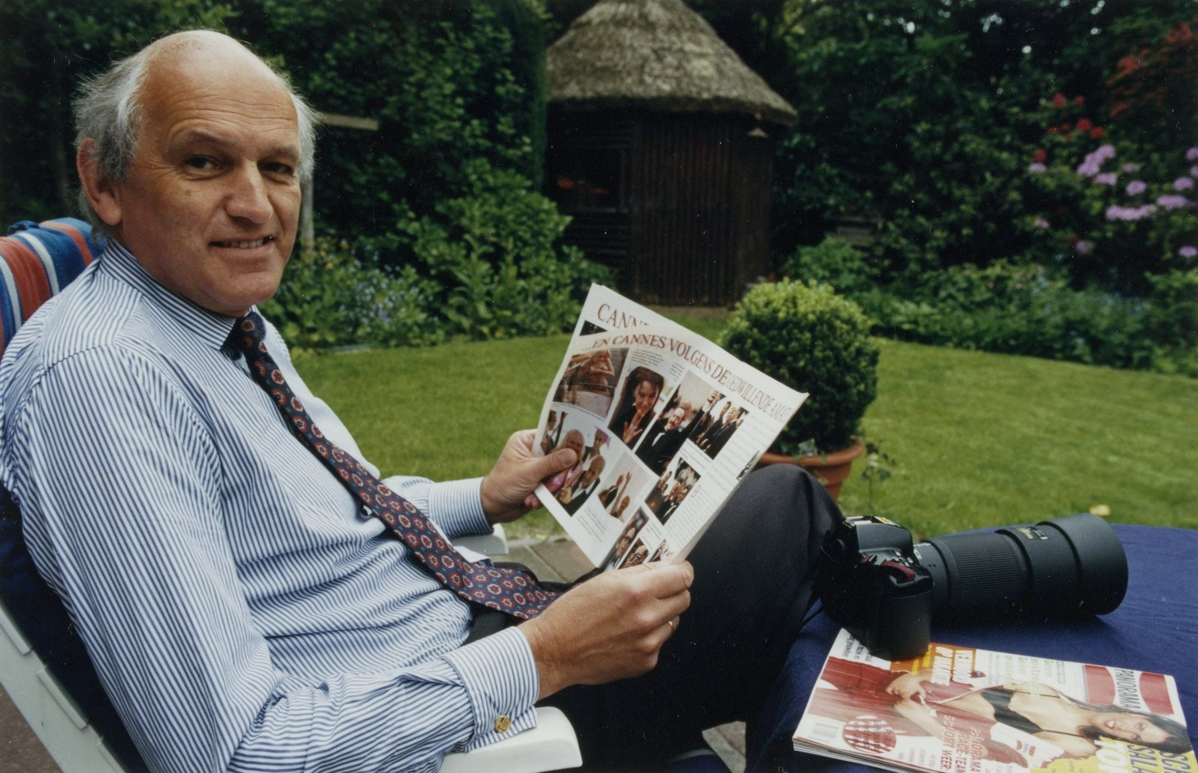 CollectieCollectie Fotoburo de BoerInventarisnummerNL-HlmNHA_54037317NL-HlmNHA_1478_44244kBeschrijvingPortret van burgemeester Pop t.g.v. zijn fotoreportage over Cannes.FotonummerNL-HlmNHA_1478_4766DocumenttypePortrettenSoort vervaardigerFotograaf AnnotatiesR1-99HD.280597PersonenPop, Jacobus Johannes Hermanus (Jaap) (* 1941) Functies personenburgemeester LandNederland ProvincieNoord-Holland GemeenteHaarlem PlaatsHaarlem StraatVijverlaan GeografischDe Hout Begindatum05-1997Einddatum05-1997TechniekFoto TrefwoordenBurgemeesters, Portretten